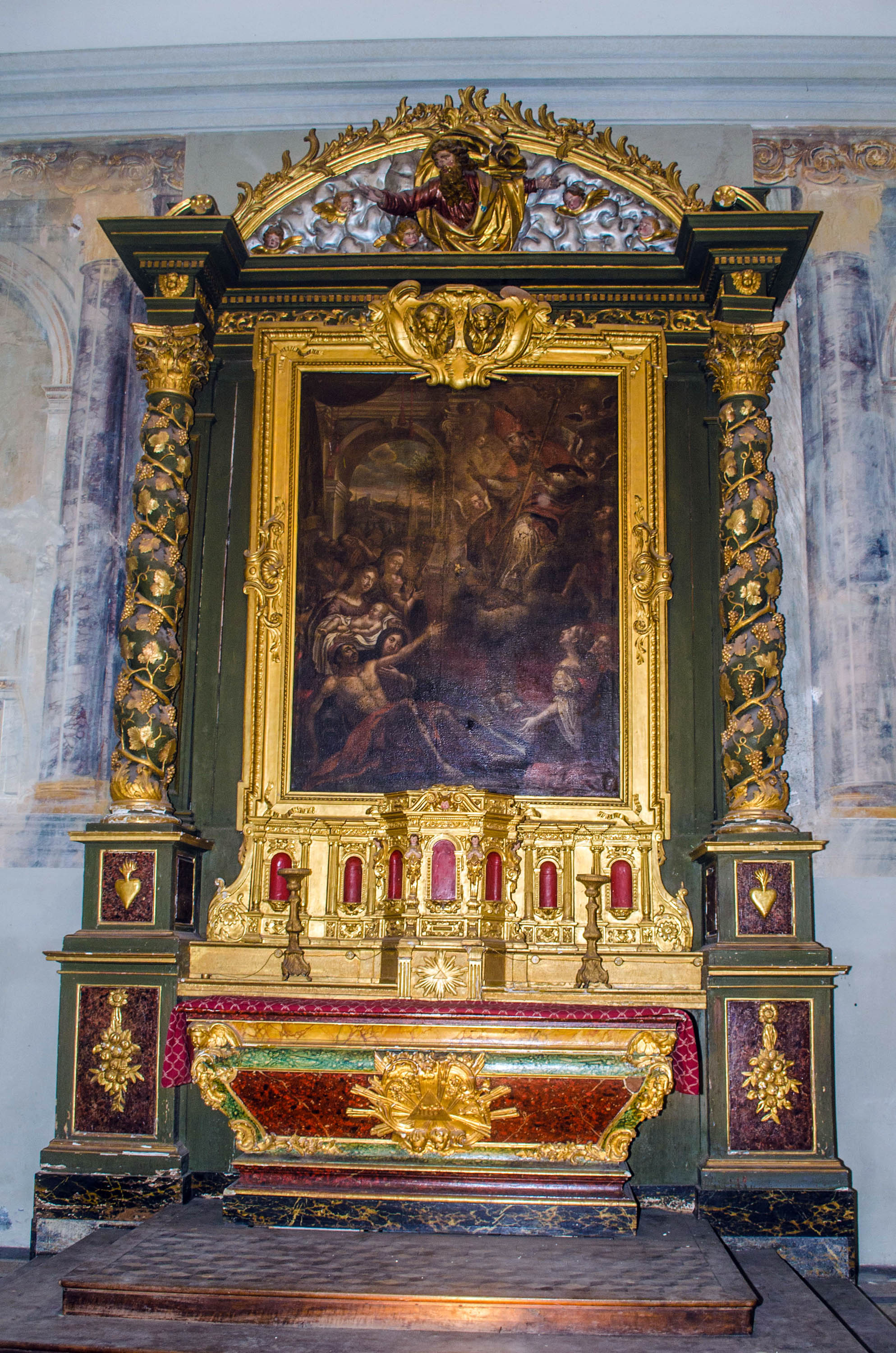 Valence (Drôme), chapelle des Capucins, retable principal Saint venance